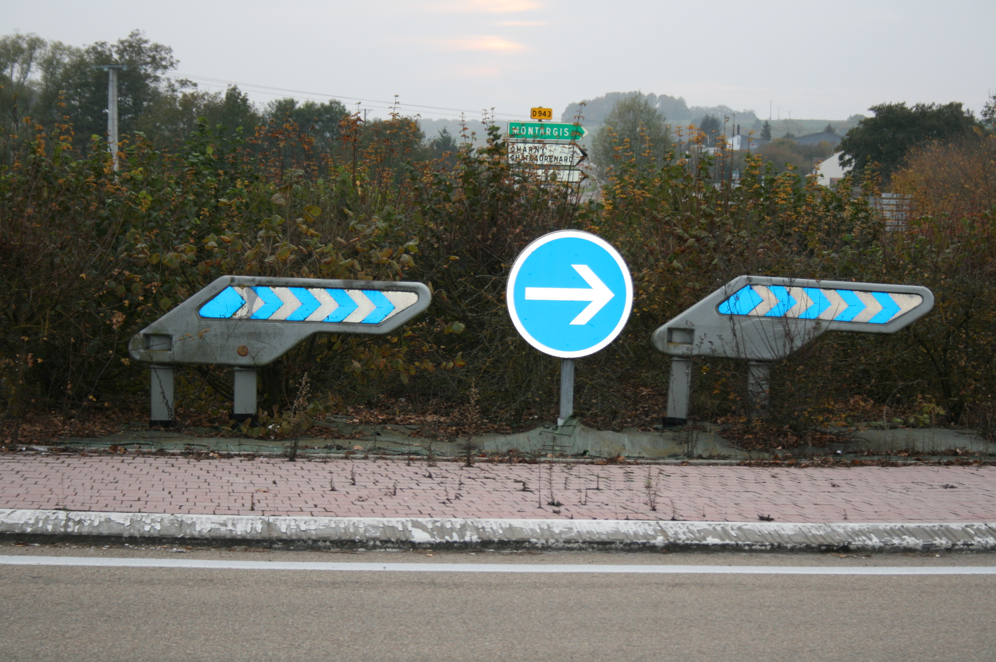 Balise de virage J4 non réglementaire (France)